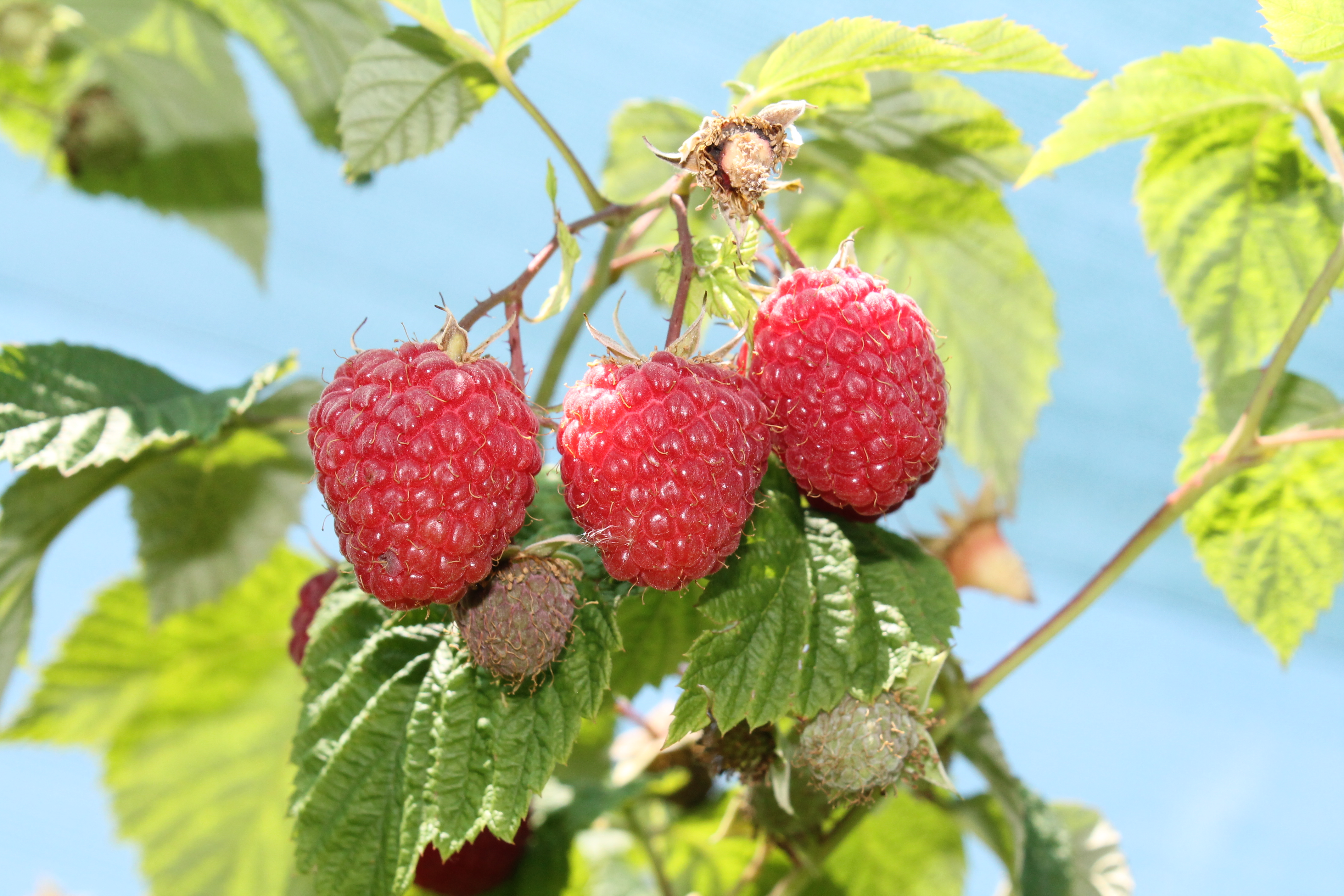 Плодови Микера